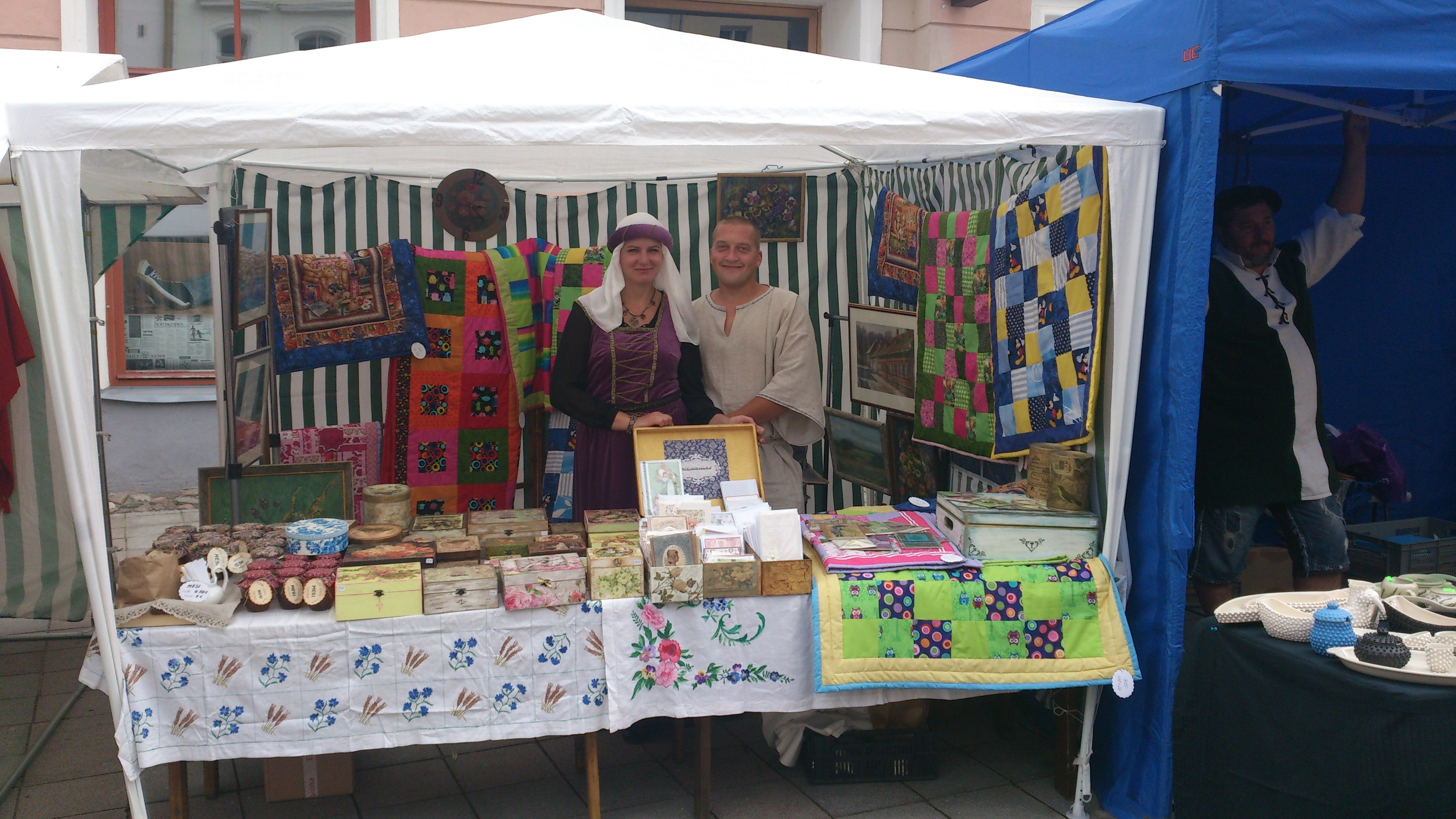 Noored müüjad Tartu hansalaadal 2014